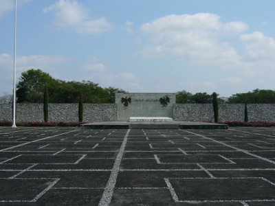 Explanada de Camaron de Tejeda